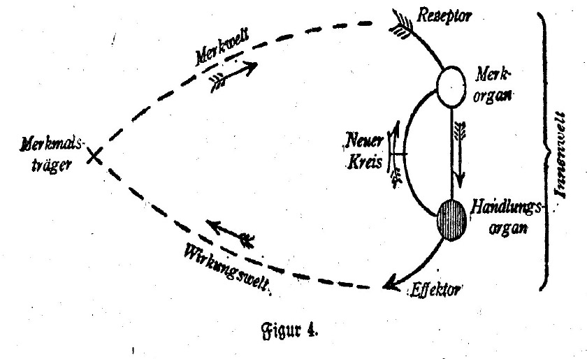 Originaler Wirkkreis von Uexküll